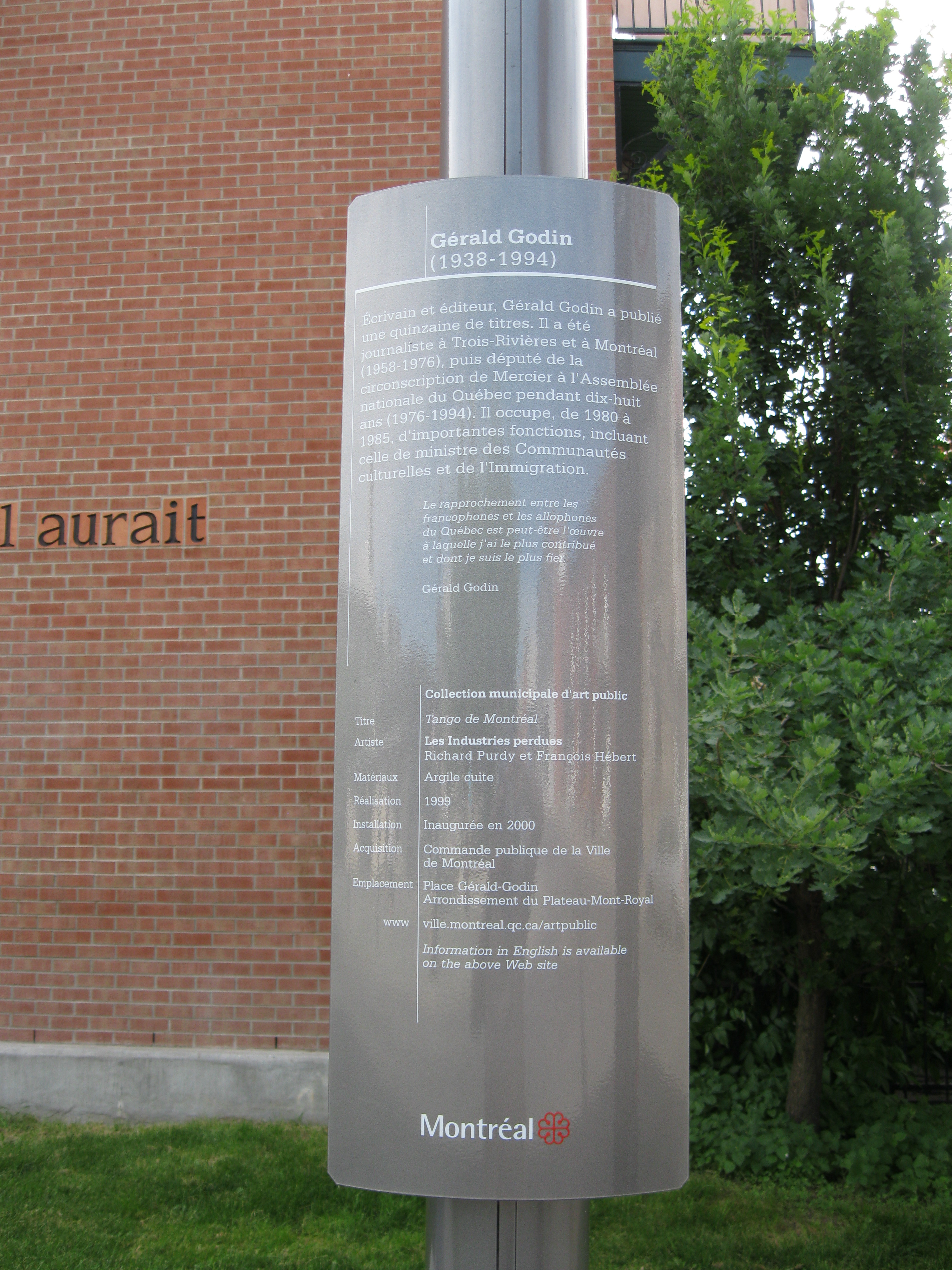 Présentation de Tango de Montréal, poème de Gérald Godin, sur un mur de Montéal